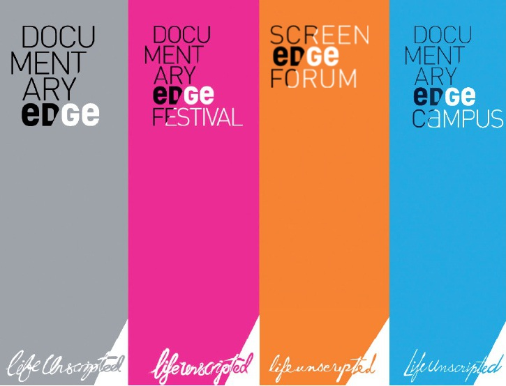 Documentary Edge Activities